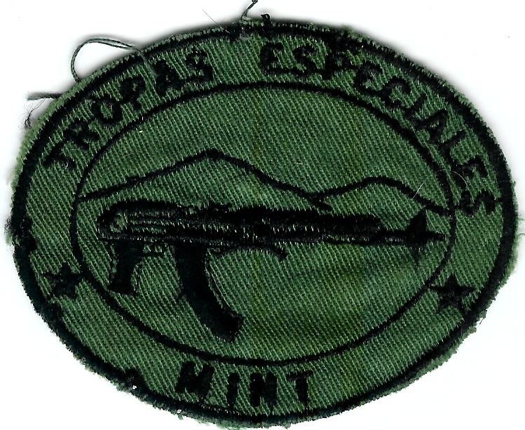 Parche distintivo de las Tropas Especiales "Pablo Úbeda", Ministerio del Interior- República de Nicaragua (1979-1989). En hombro derecho del uniforme de gala.